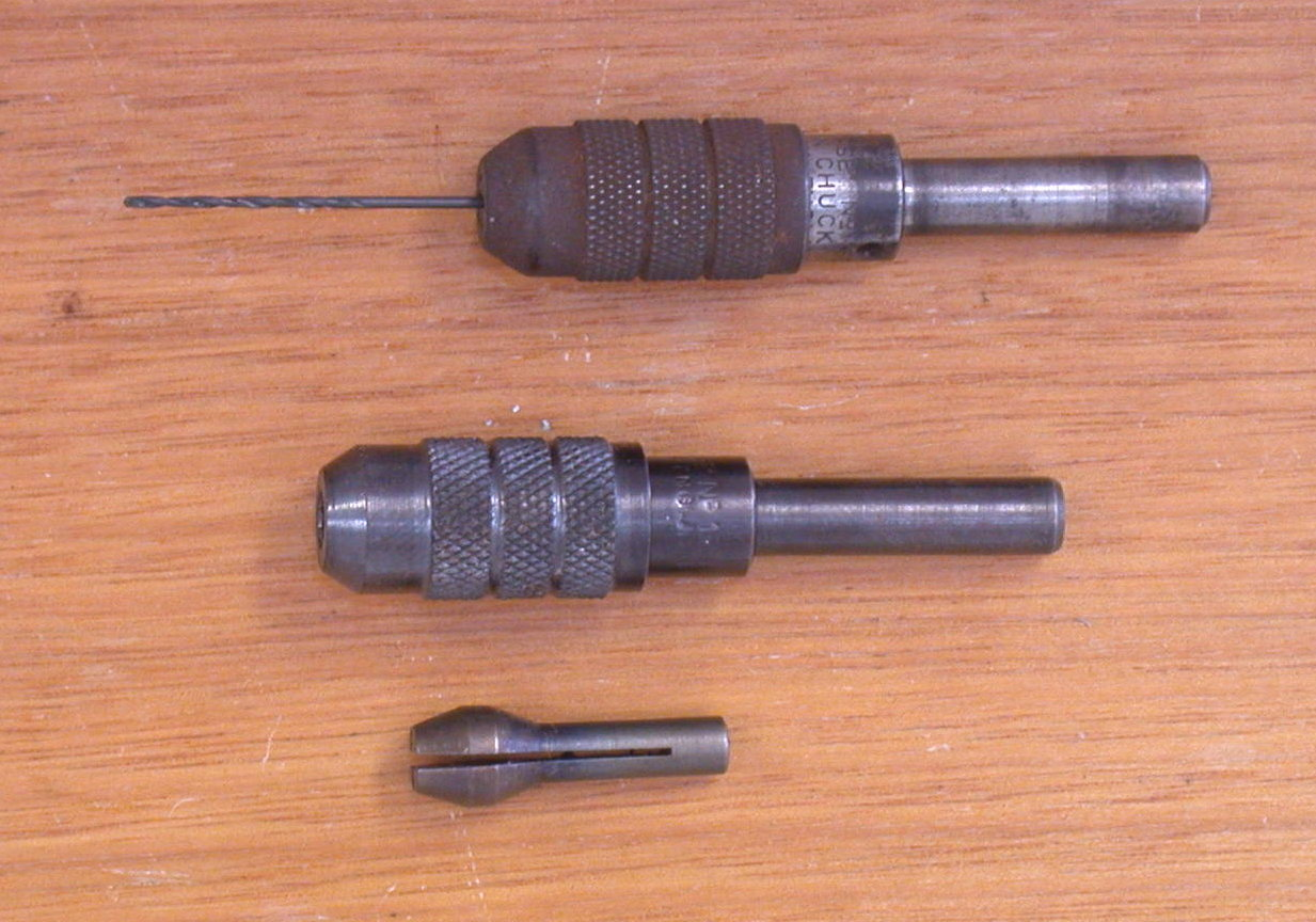 Assembled pin chuck holding a small drill (0.5mm), lower item is a pin chuck collet.